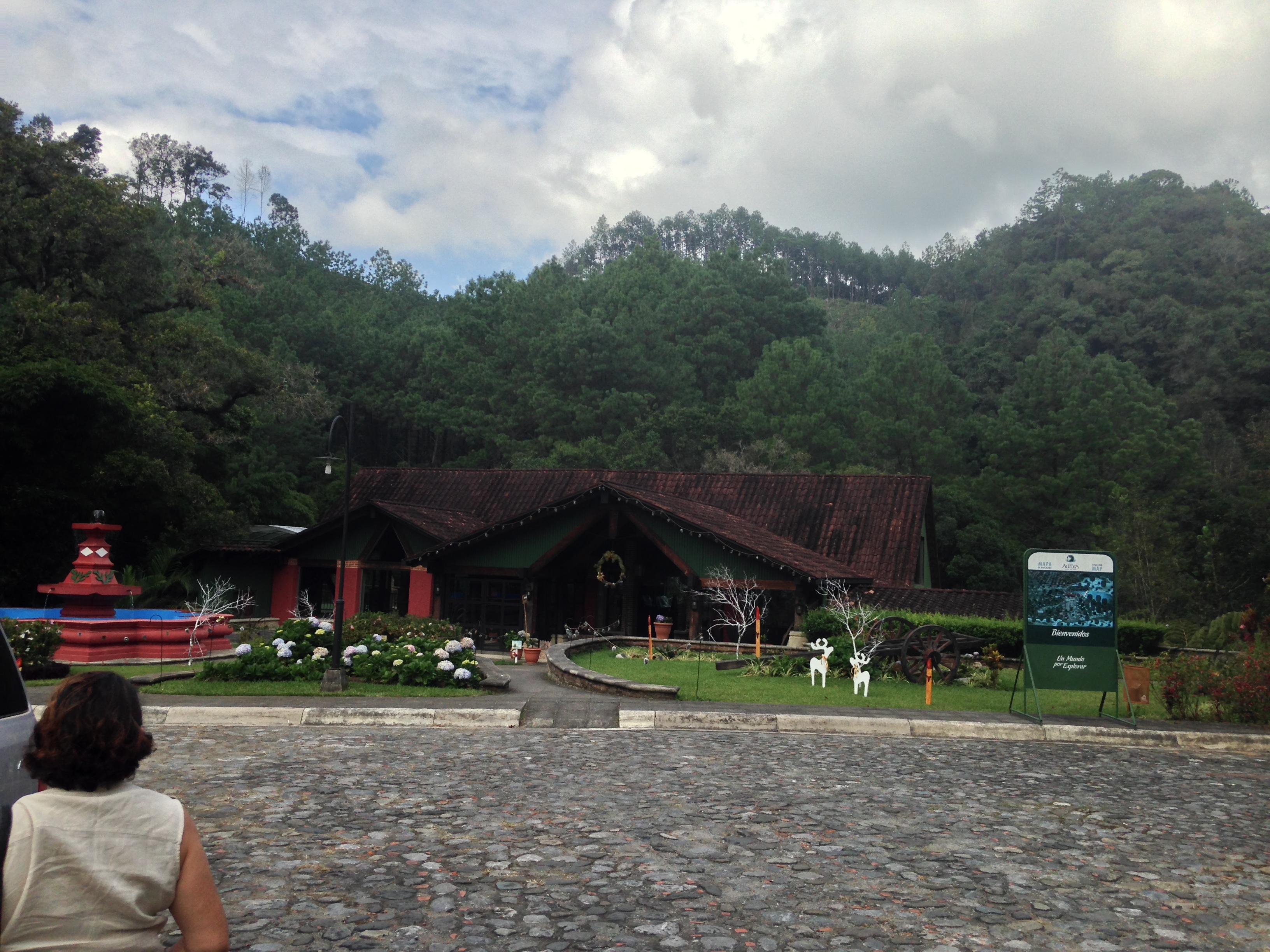 Santa Cruz Verapaz en diciembre de 2015